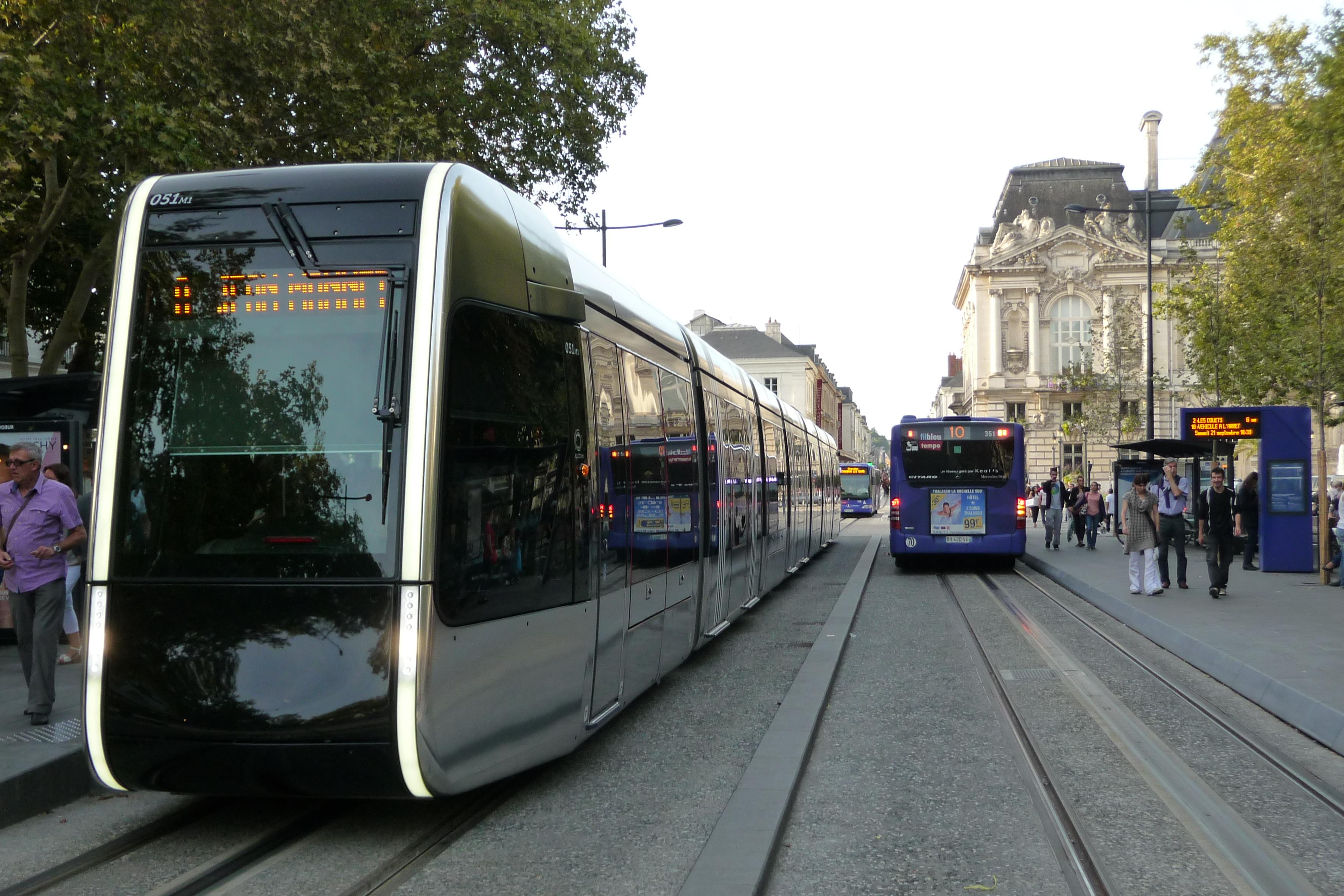 Rame du tramway de Tours, arrêt « Jaurès » (avenue Grammont). Les bus Fil bleu empruntent sur une courte distance la voie utilisée par les tramways.